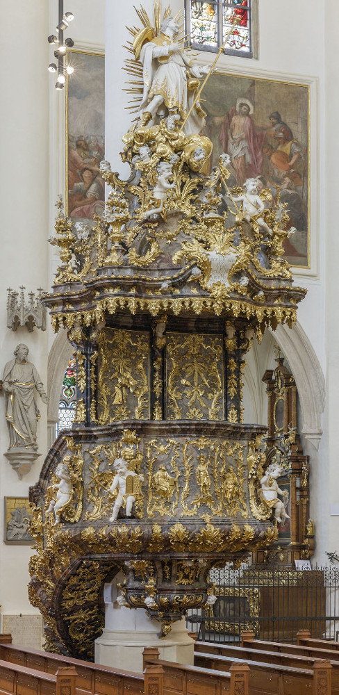 St. Jakob Straubing - Kanzel